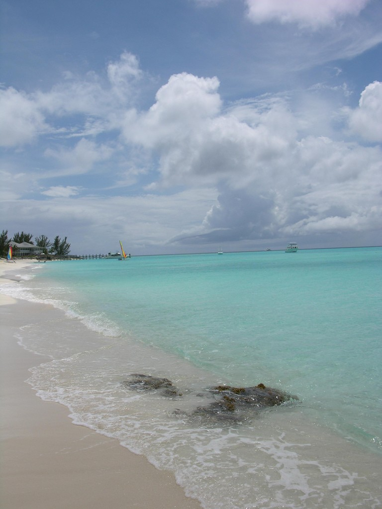 Columbus Island, Bahamas